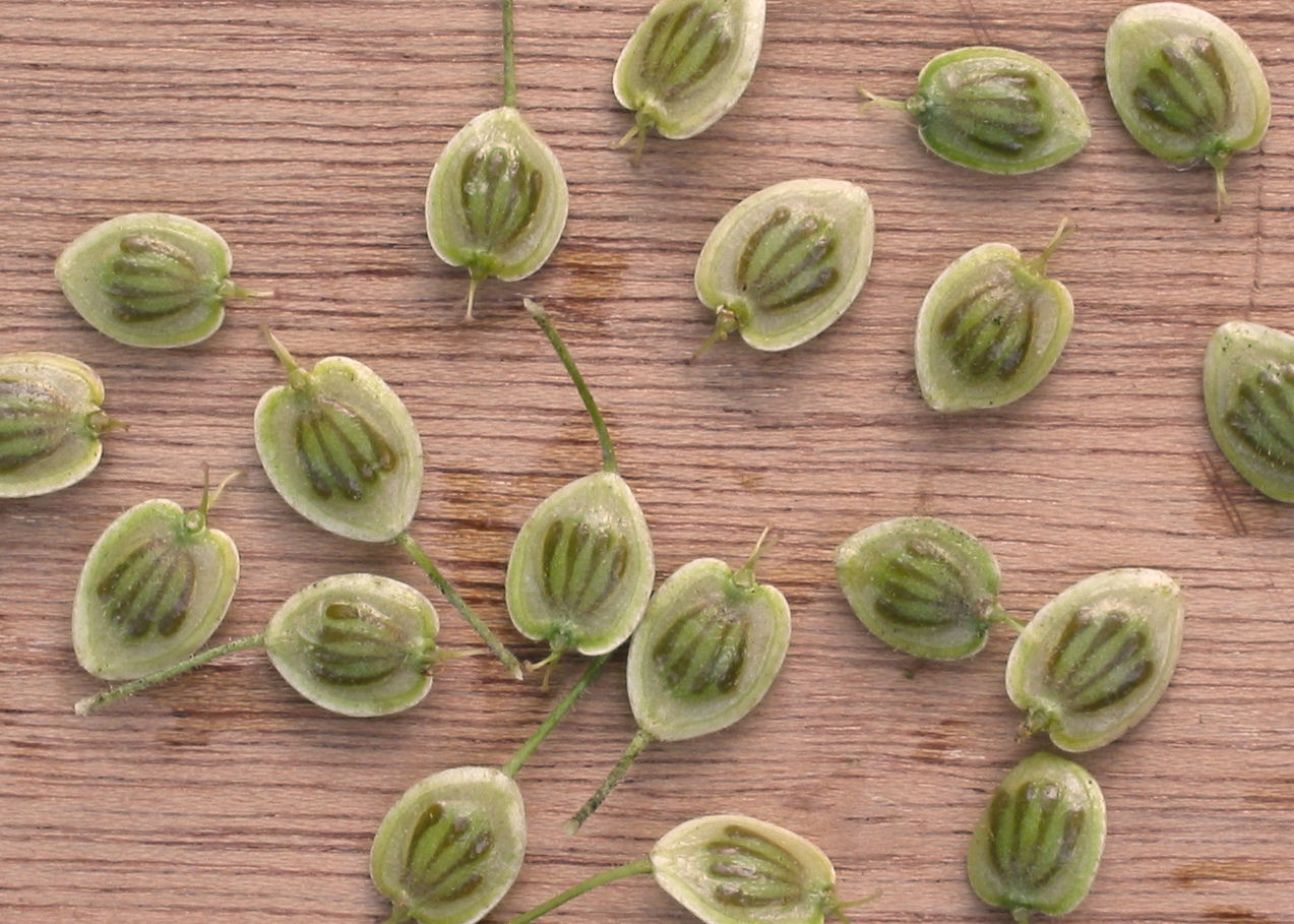 Heracleum mantegazzianum fruits (Reuzenberenklauw vruchten)